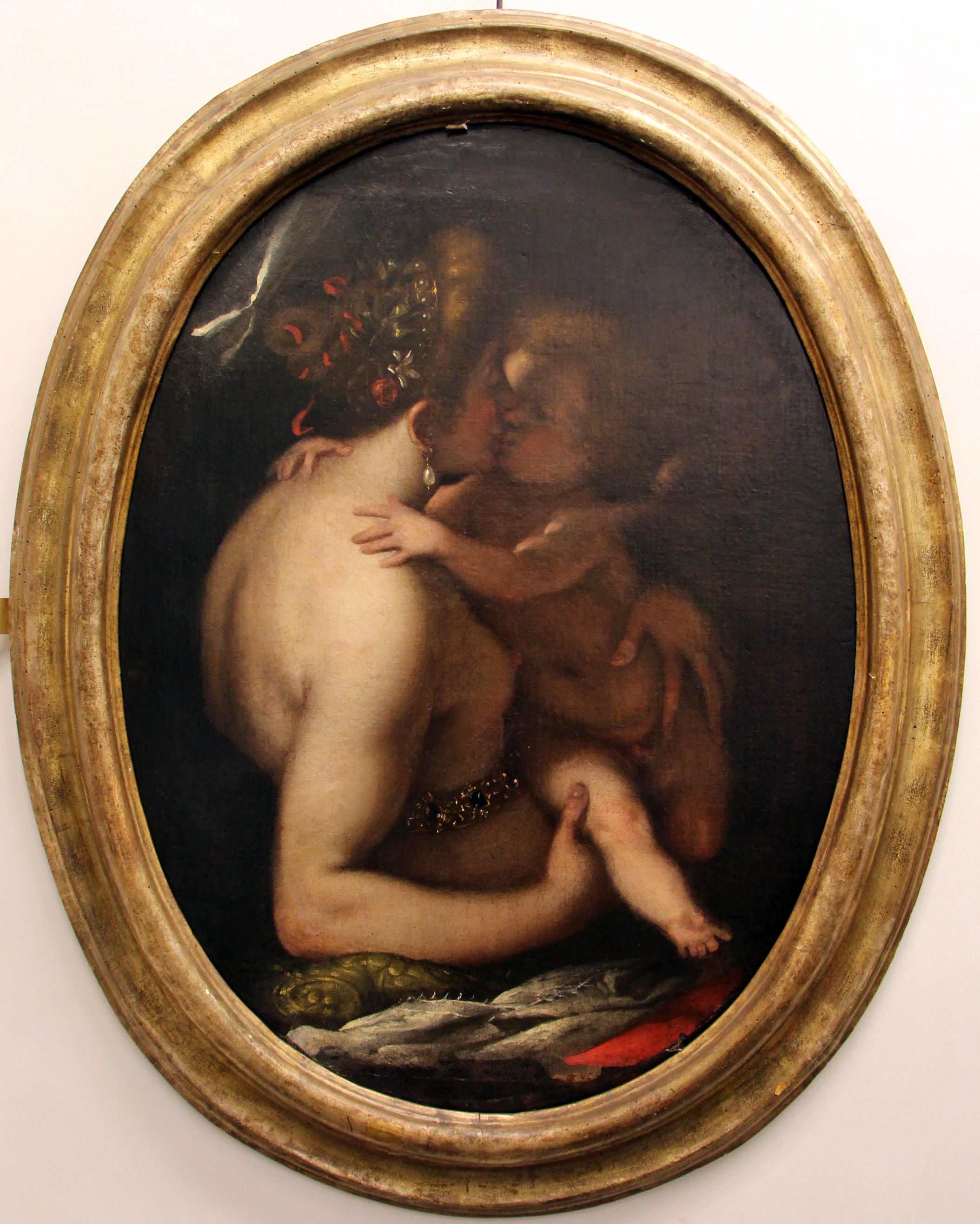 Palazzo Bianco o Palazzo Doria Brignole - Musei di Strada Nuova The making of this document was supported by Wikimedia CH. (Submit your project!) For all the files concerned, please see the category Supported by Wikimedia CH. This is a photo of a monument which is part of cultural heritage of Italy.